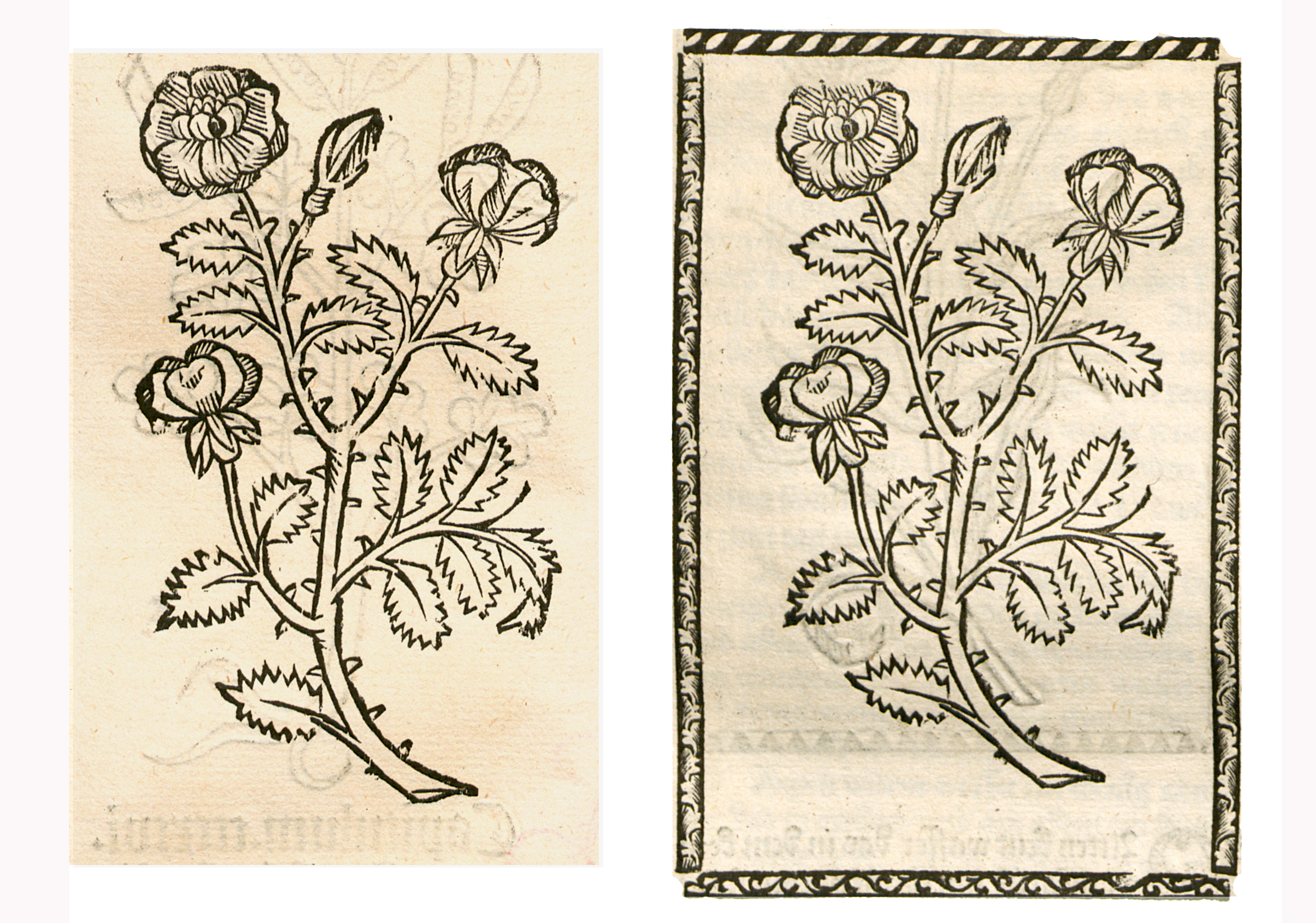 Abbildung von: Rosen